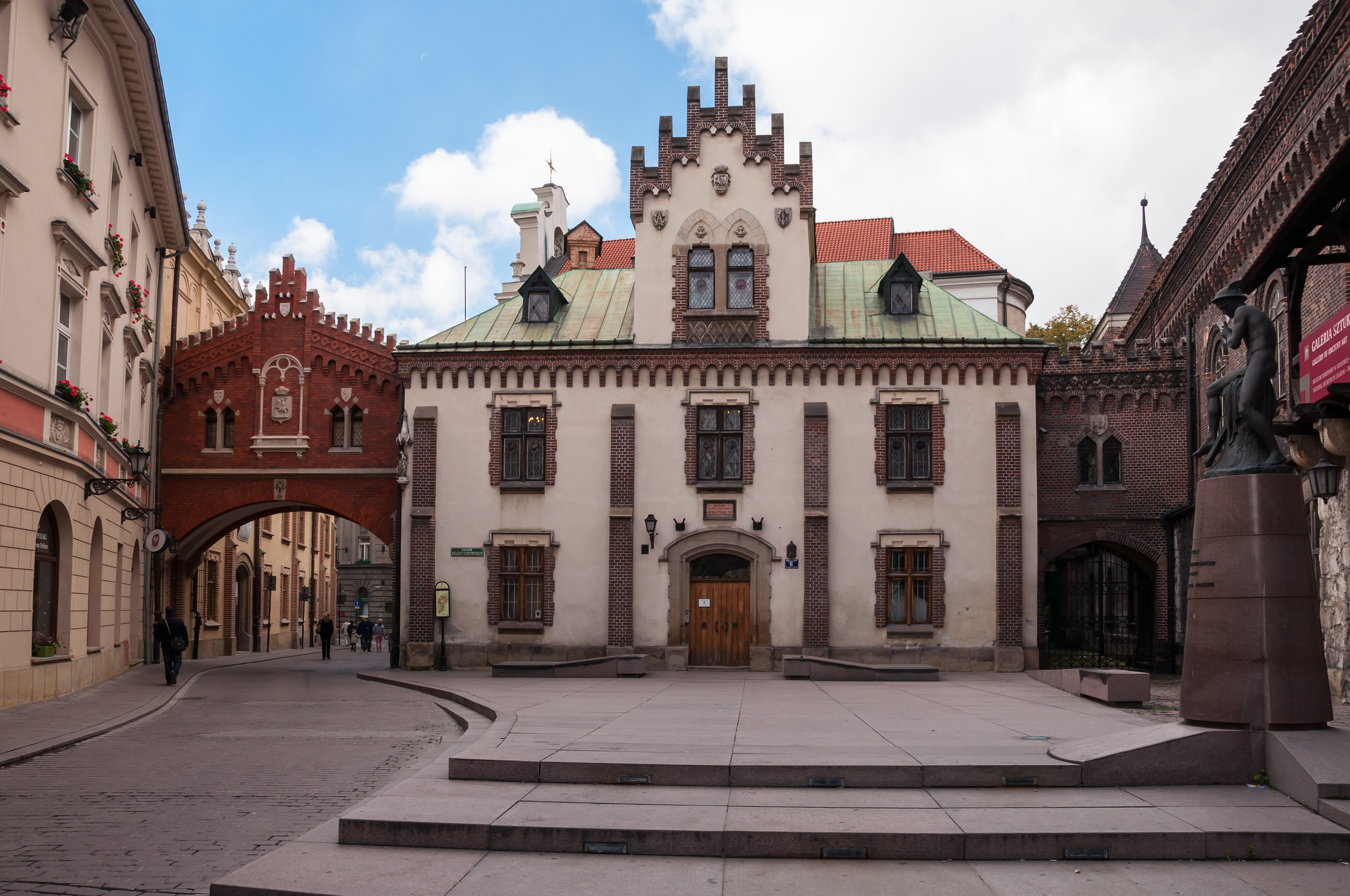 Kraków, ul. Pijarska 6. Budynek, tzw. klasztorek (d. klasztor), 1750, 1879-84.